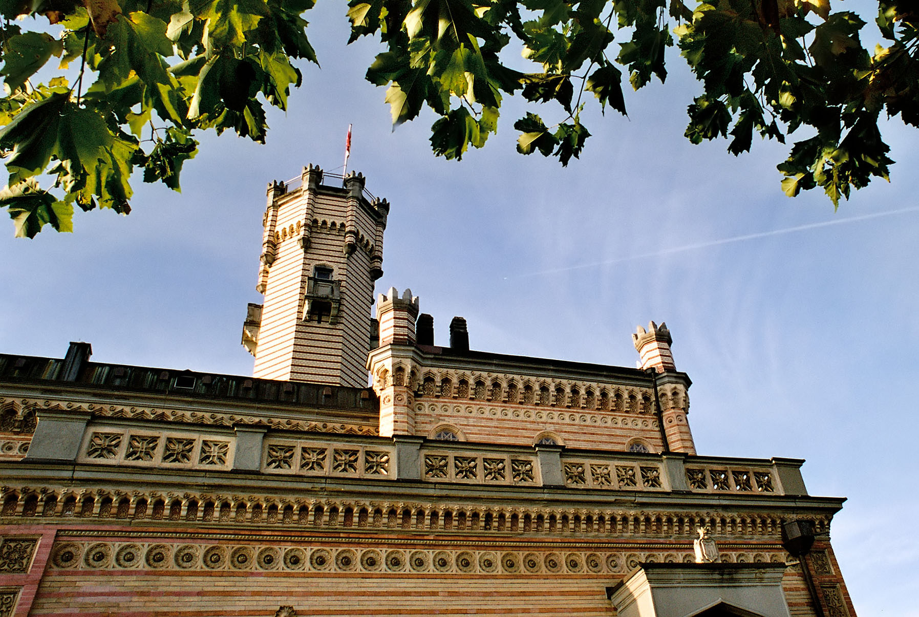 Schloss Montfort